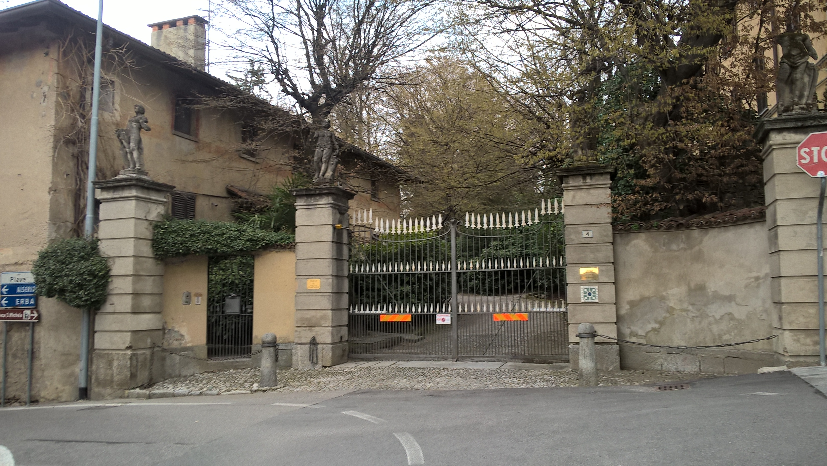 Entrata di Villa Carcano in via piave 4